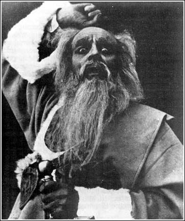 Photograph of Dobrica Milutinović, in King Lear, 1924/Photographie de Dobrica Milutinović dans le rôle du roi Lear, 1924